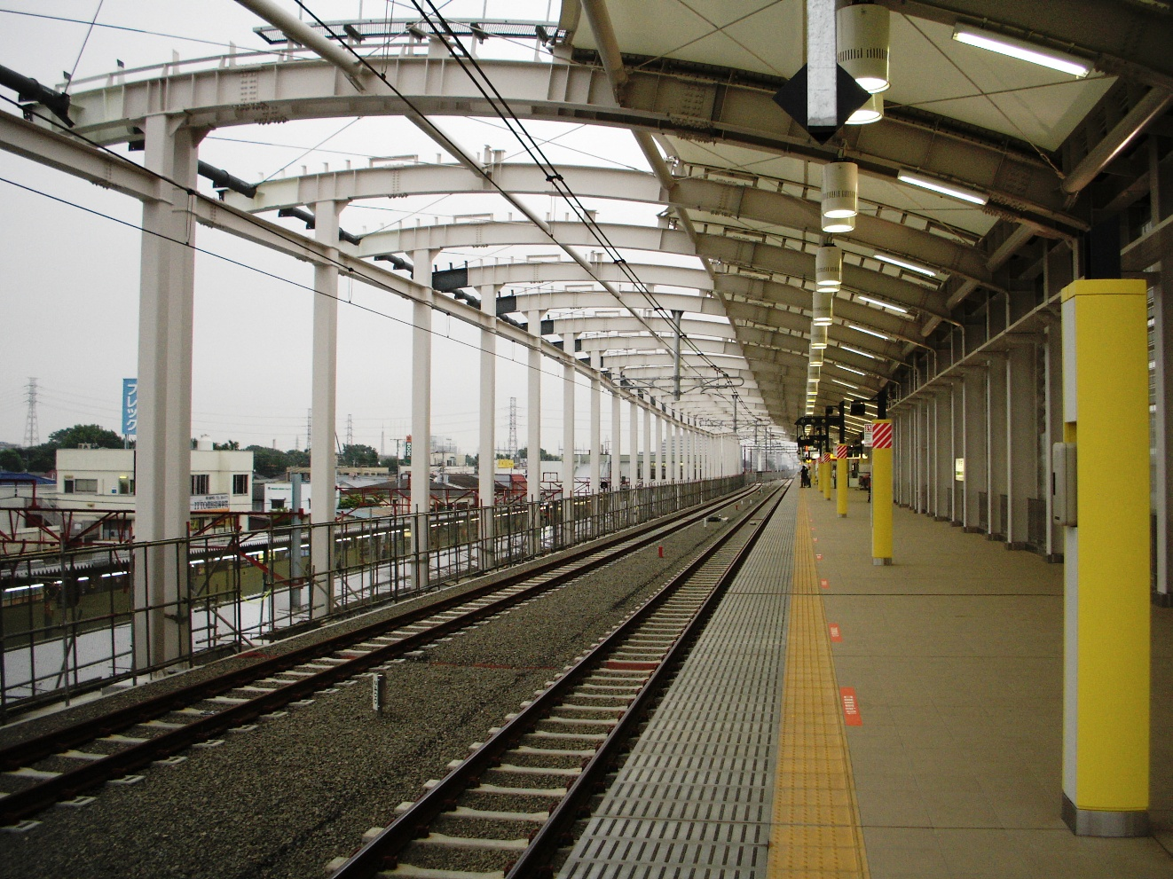 東小金井駅2番ホーム